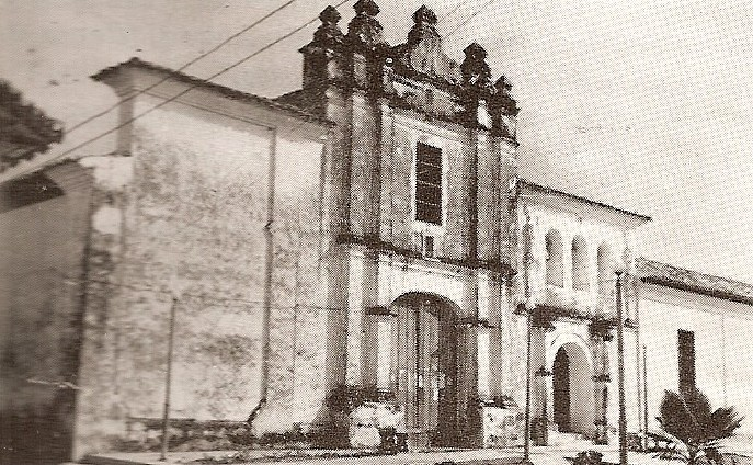 Convento de San Francisco en Guanare, estado Portuguesa - Venezuela